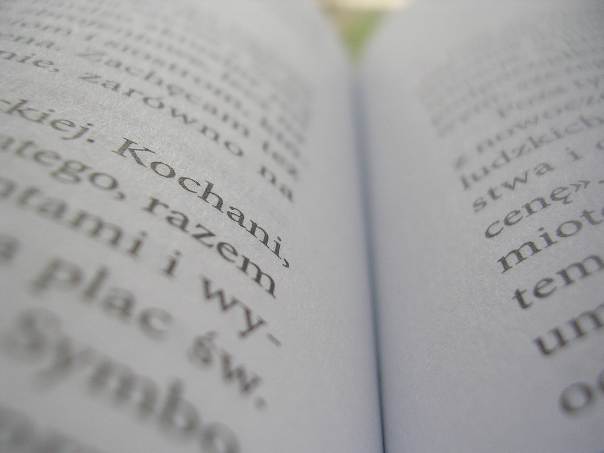 Kochani...